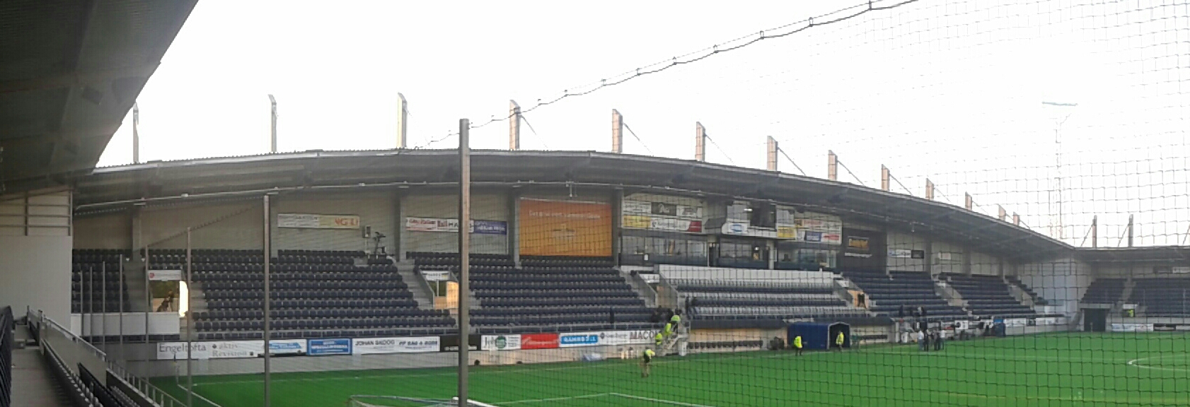 Gavlevallen